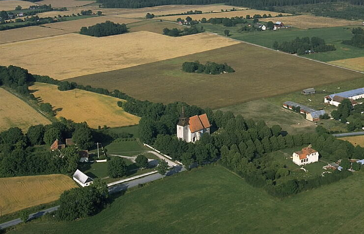 Motiv: Vänge kyrka Nyckelord: Flygbilder, Riksintressen Kategori: KyrkomiljöVänge kyrka